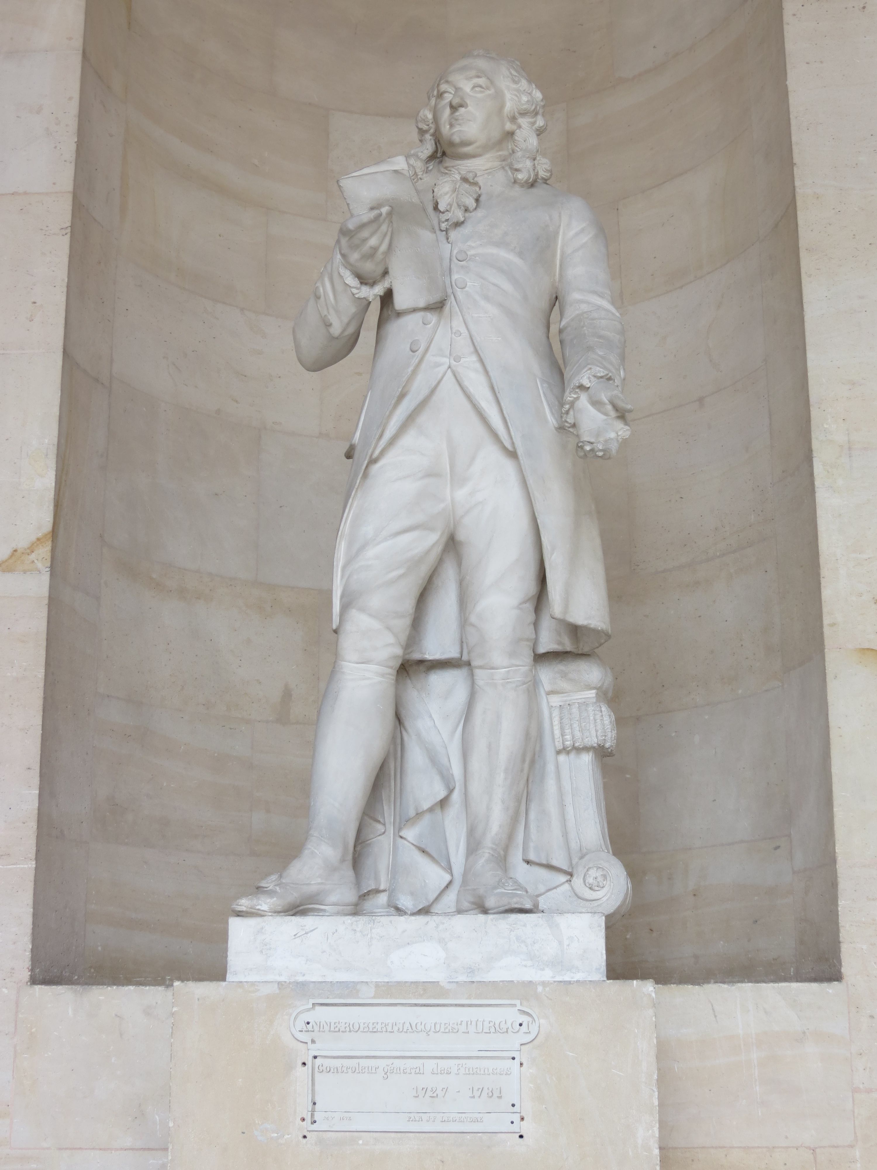 Jean-François Legendre-Héral (1796-1851), Anne Robert Jacques Turgot, contrôleur général des finances de Louis XVI, statue en plâtre, château de Versailles.